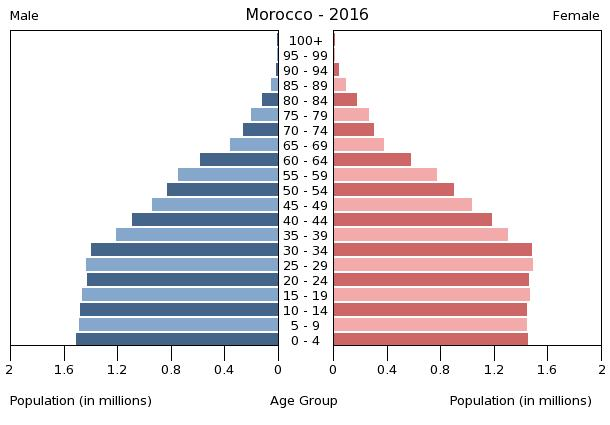 A population pyramid illustrates the age and sex structure of a country's population and may provide insights about political and social stability, as well as economic development. The population is distributed along the horizontal axis, with males shown on the left and females on the right. The male and female populations are broken down into 5-year age groups represented as horizontal bars along the vertical axis, with the youngest age groups at the bottom and the oldest at the top. The shape of the population pyramid gradually evolves over time based on fertility, mortality, and international migration trends.